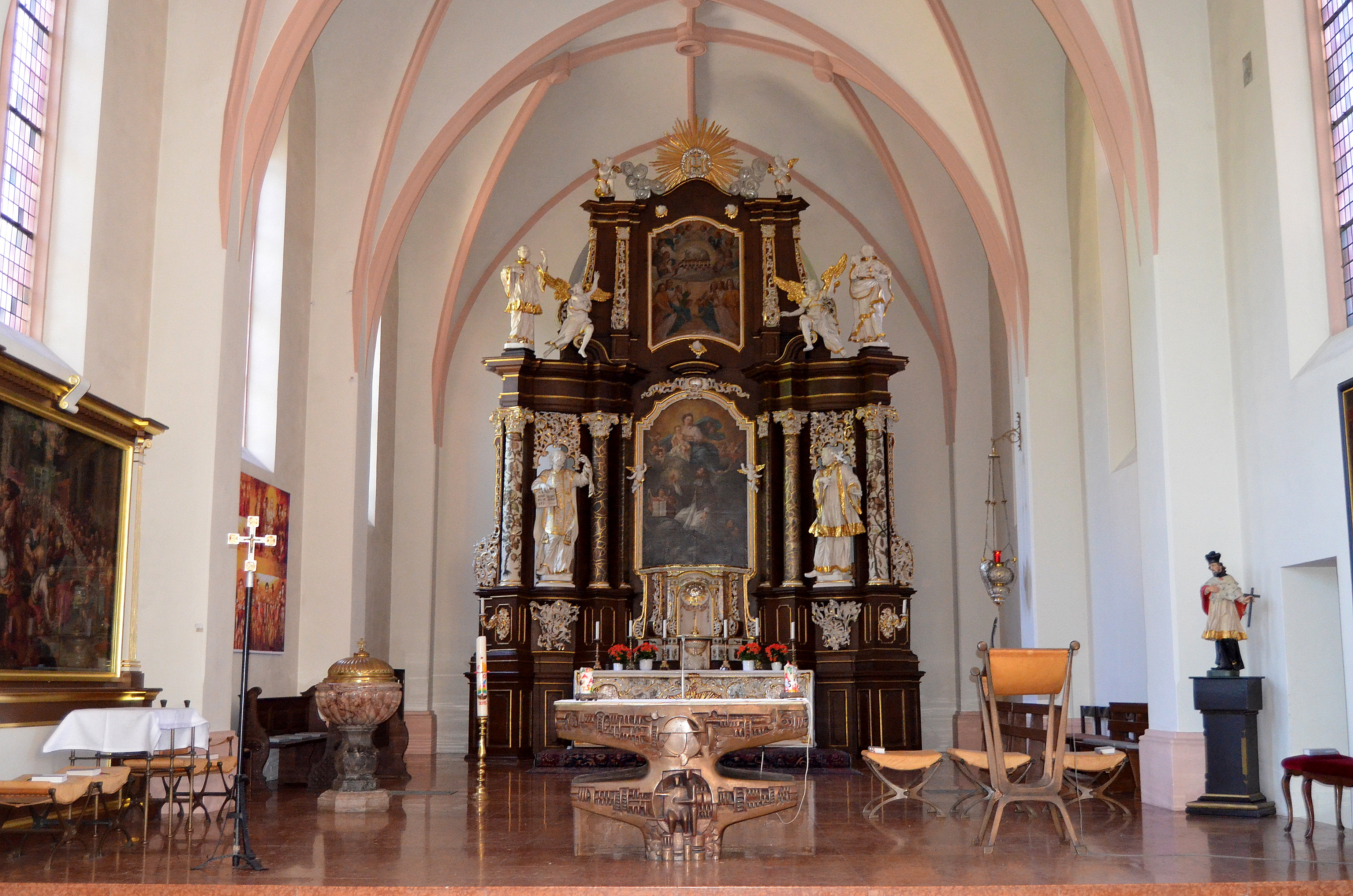 Hoogaltaar